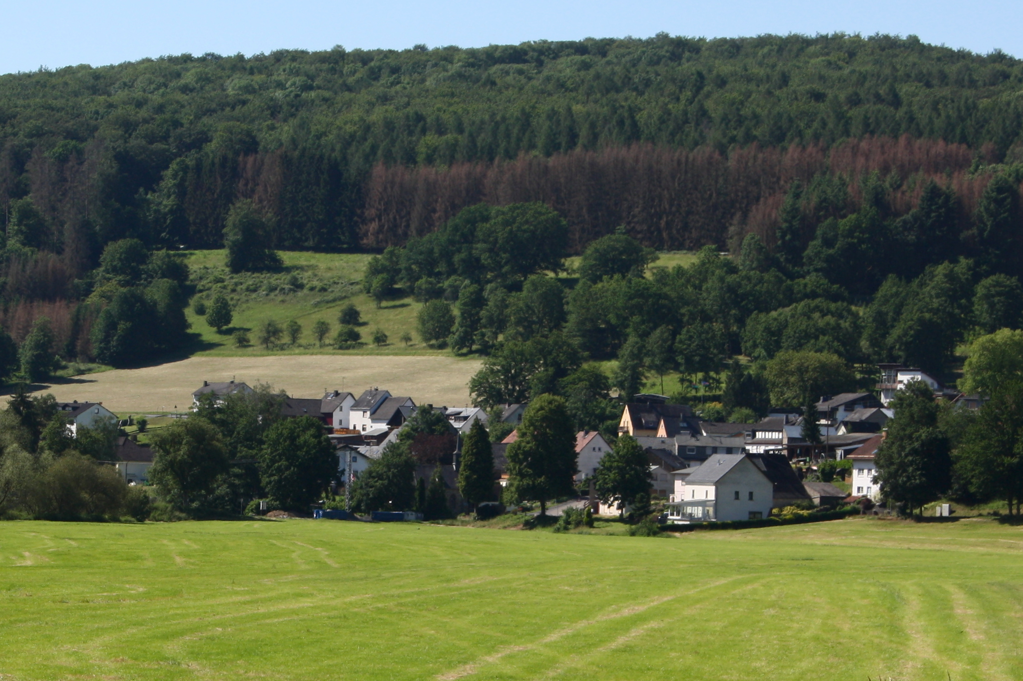 Bladernheim, Ortsteil von Montabaur, Westerwald, Rheinland-Pfalz, Deutschland